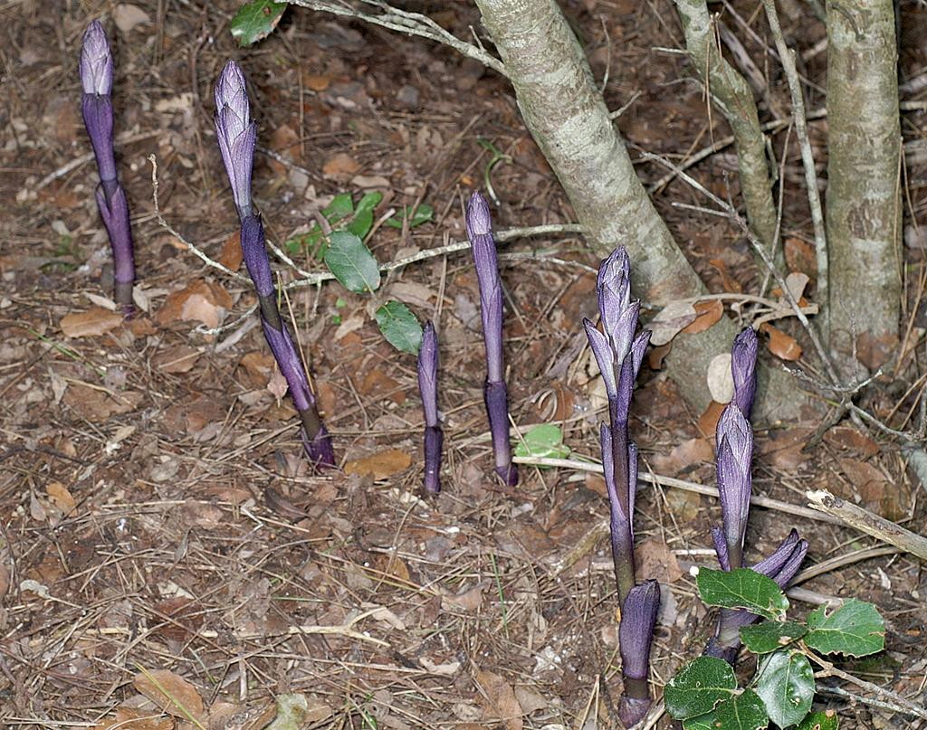 Limodorum abortivum